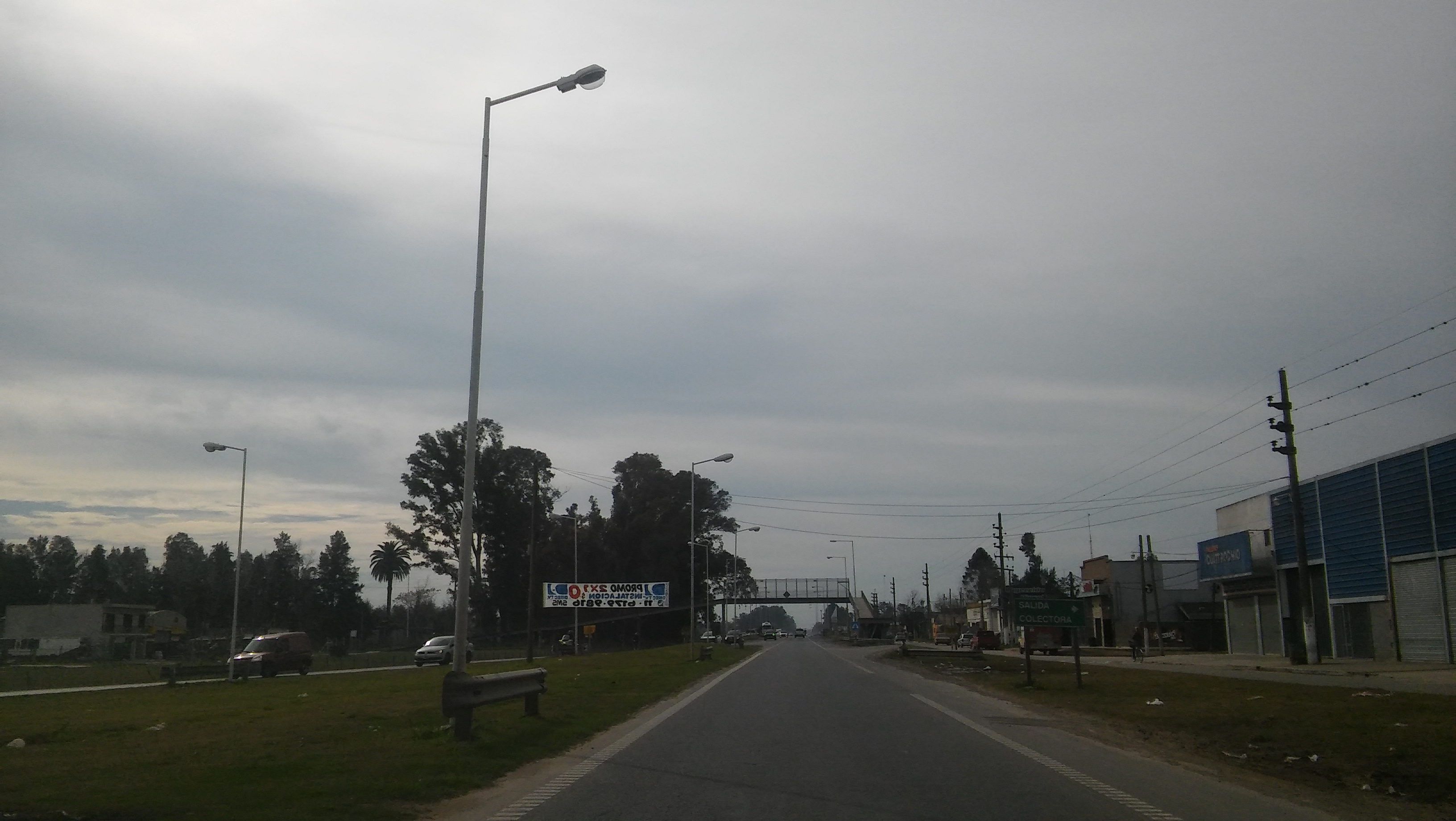 Ruta Nacional 205 (Argentina) a su paso por la localidad de Cañuelas.